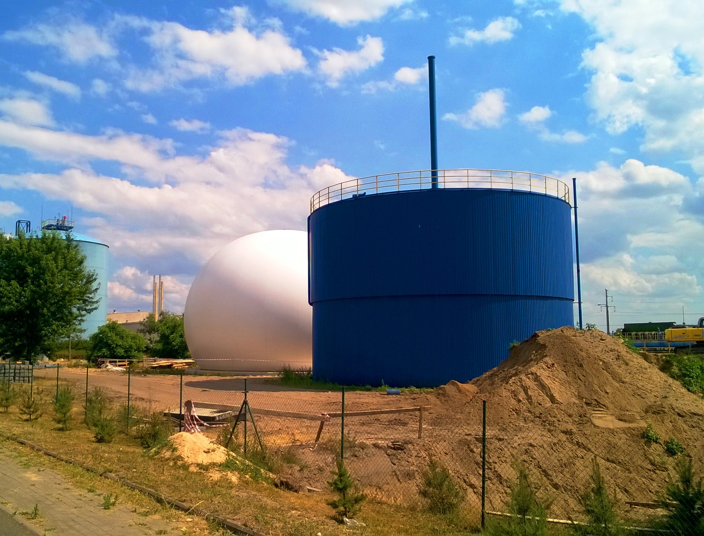 Centralna Oczyszczalnia Ścieków w Toruniu